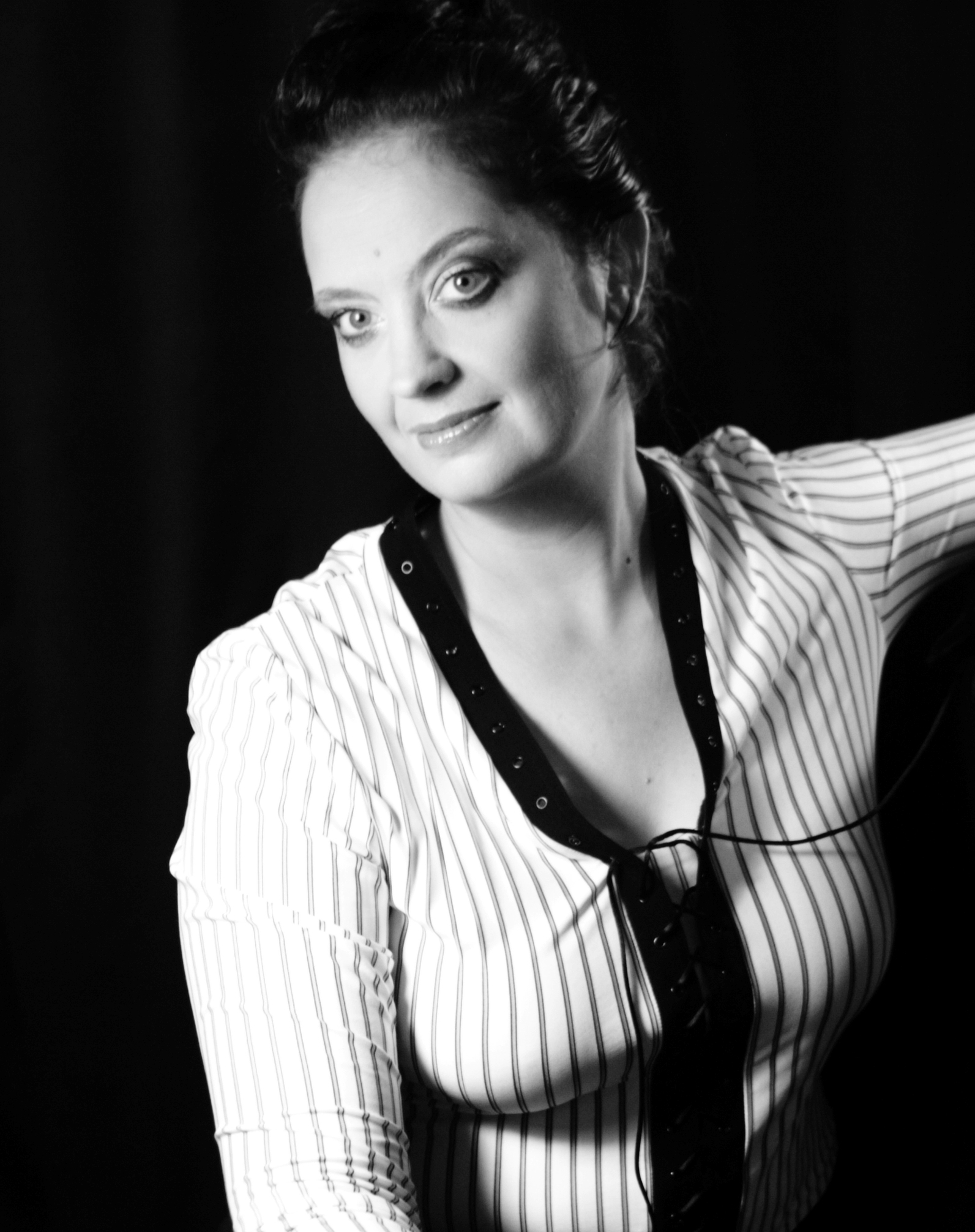 Operasångaren Ann Hallenberg